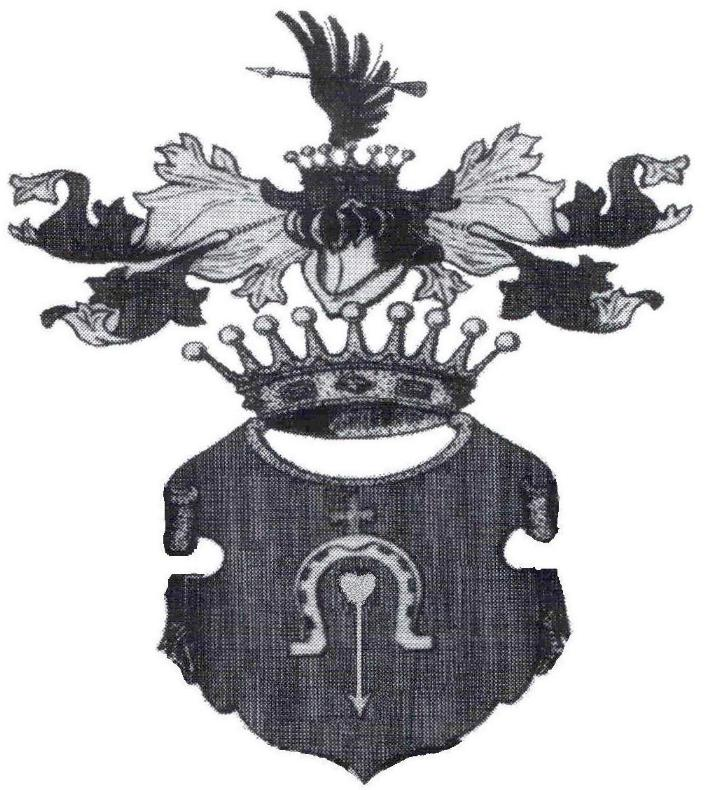 Dołęga - herb hrabiów Zaleskich